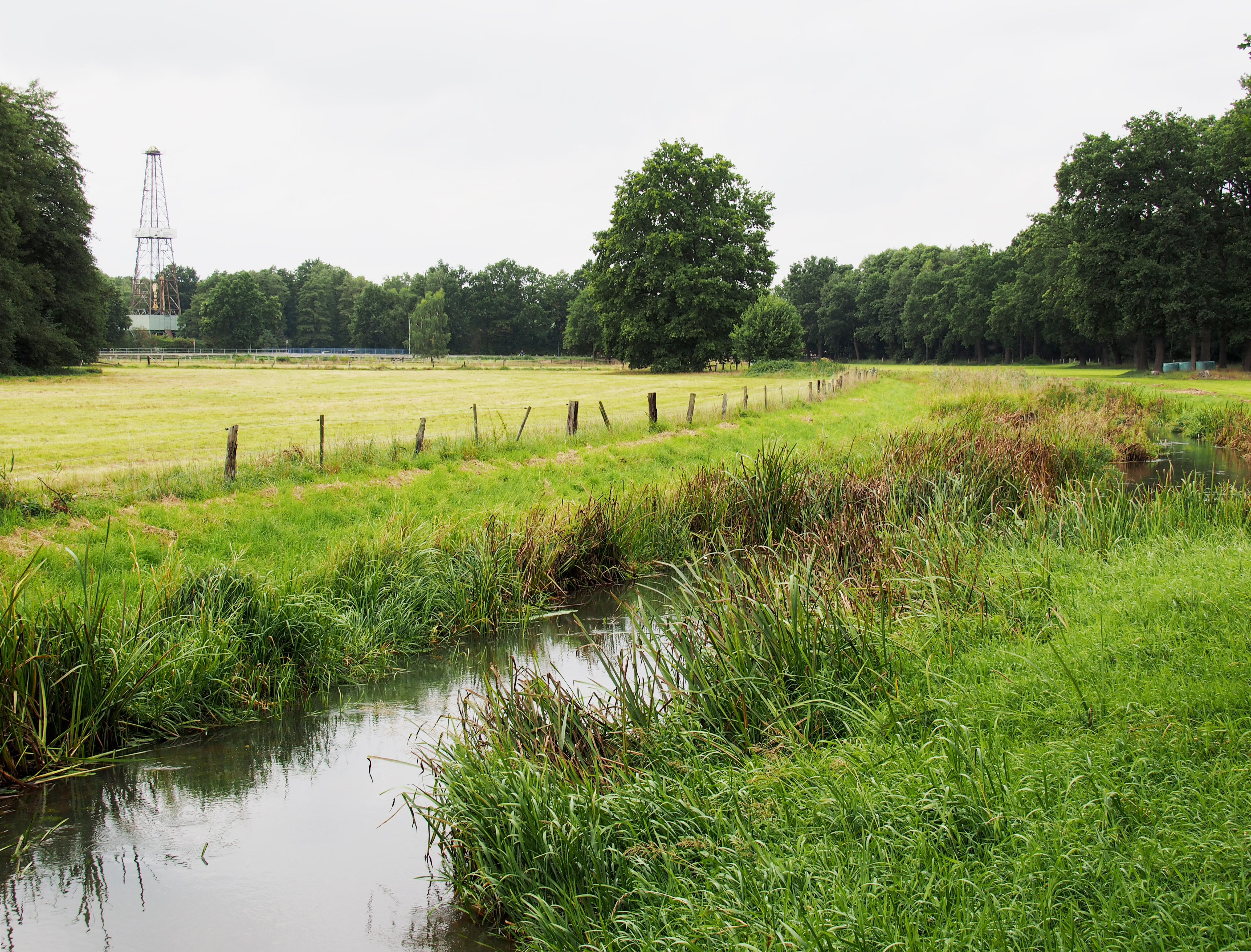 Verlauf der Wietze (Aller) im Ort Wietze (Niedersachsen)